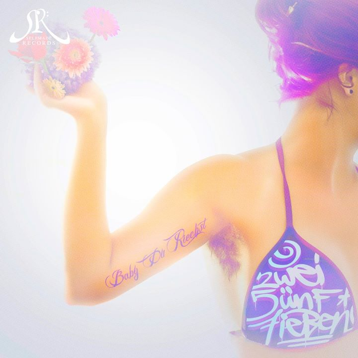 Cover der Single „Baby du riechst“